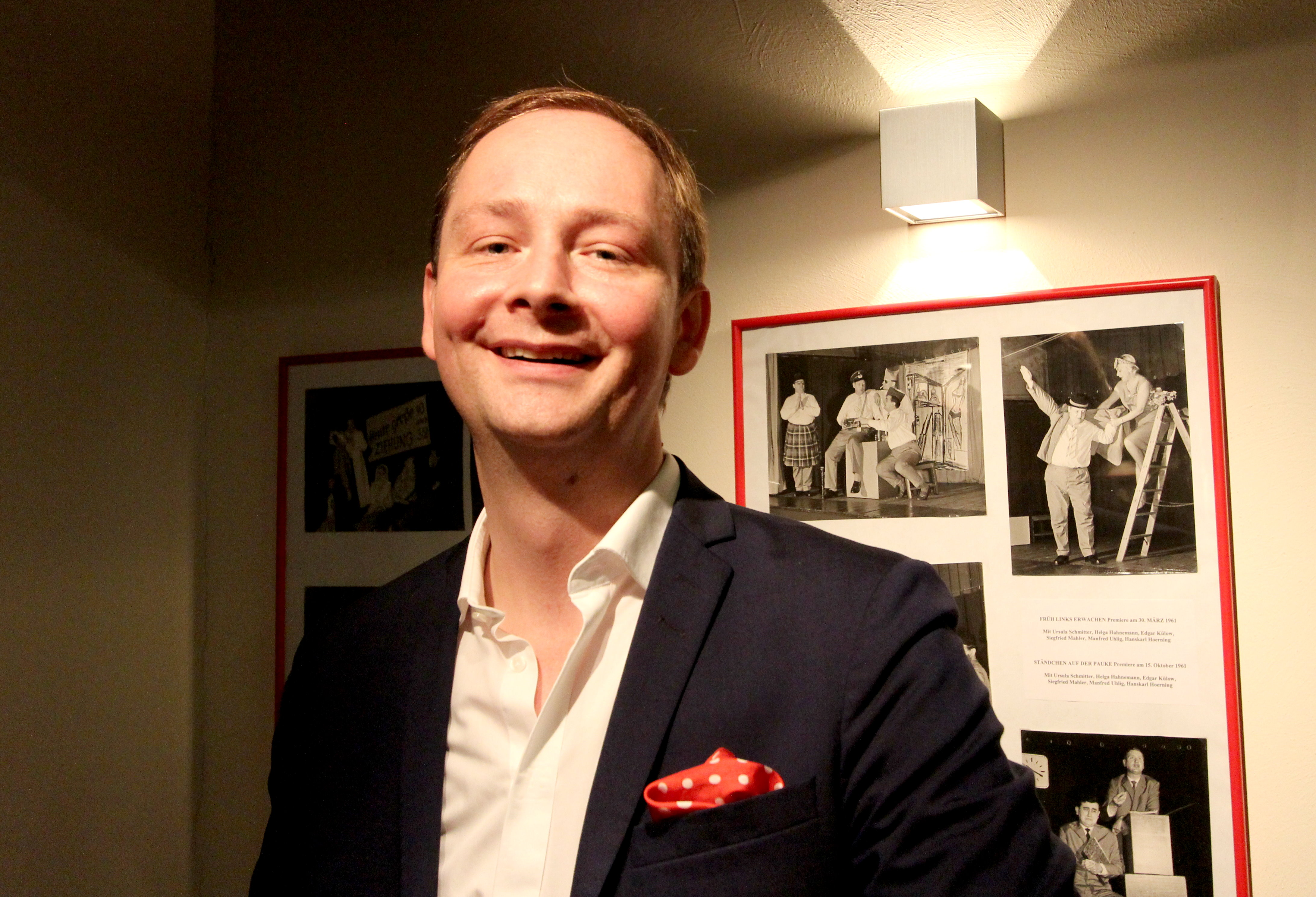 Christoph Reuter (* 1977, Dessau) ist ein deutscher Jazzpianist, Komponist und Musikpädagoge. Aufnahme Leipzig 2018.